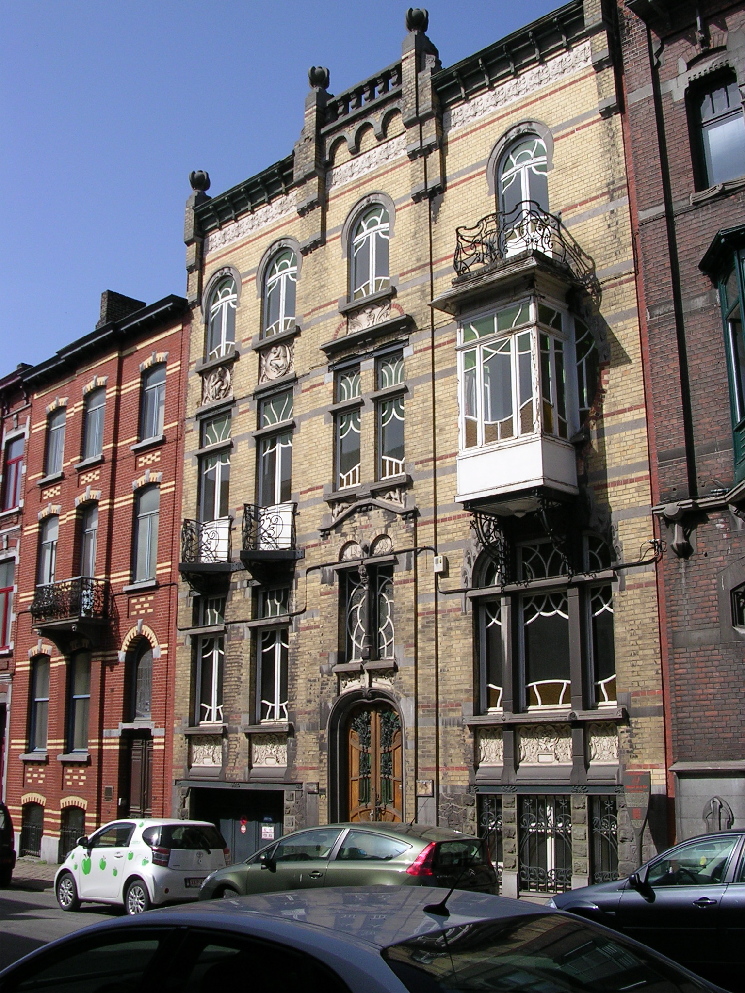 Charleroi (Belgique) - Maison dite "des Médécins", rue Léon Bernus 40 à Charleroi. Maison Art nouveau construite en 1908 par l'architecte Machelidon, classée en 1994.